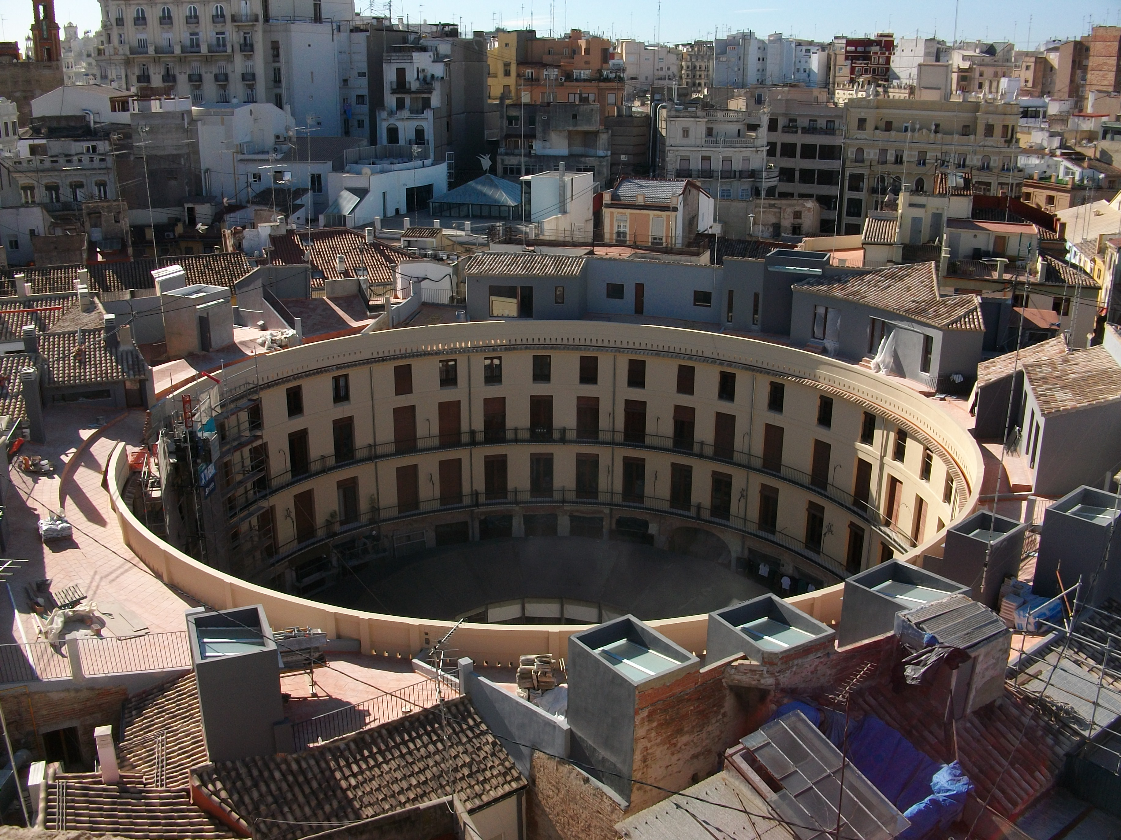 Vista de la Plaça Redona des de el campanar de Santa Caterina.